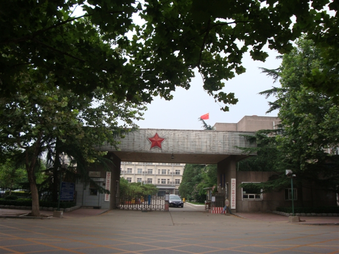 中文（中国大陆）: 位于河北省唐山市